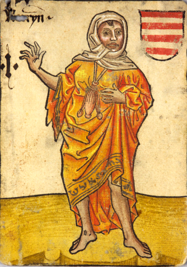 Jeu de cartes Hofämterspiel (Hongrie, I : la bouffonne)